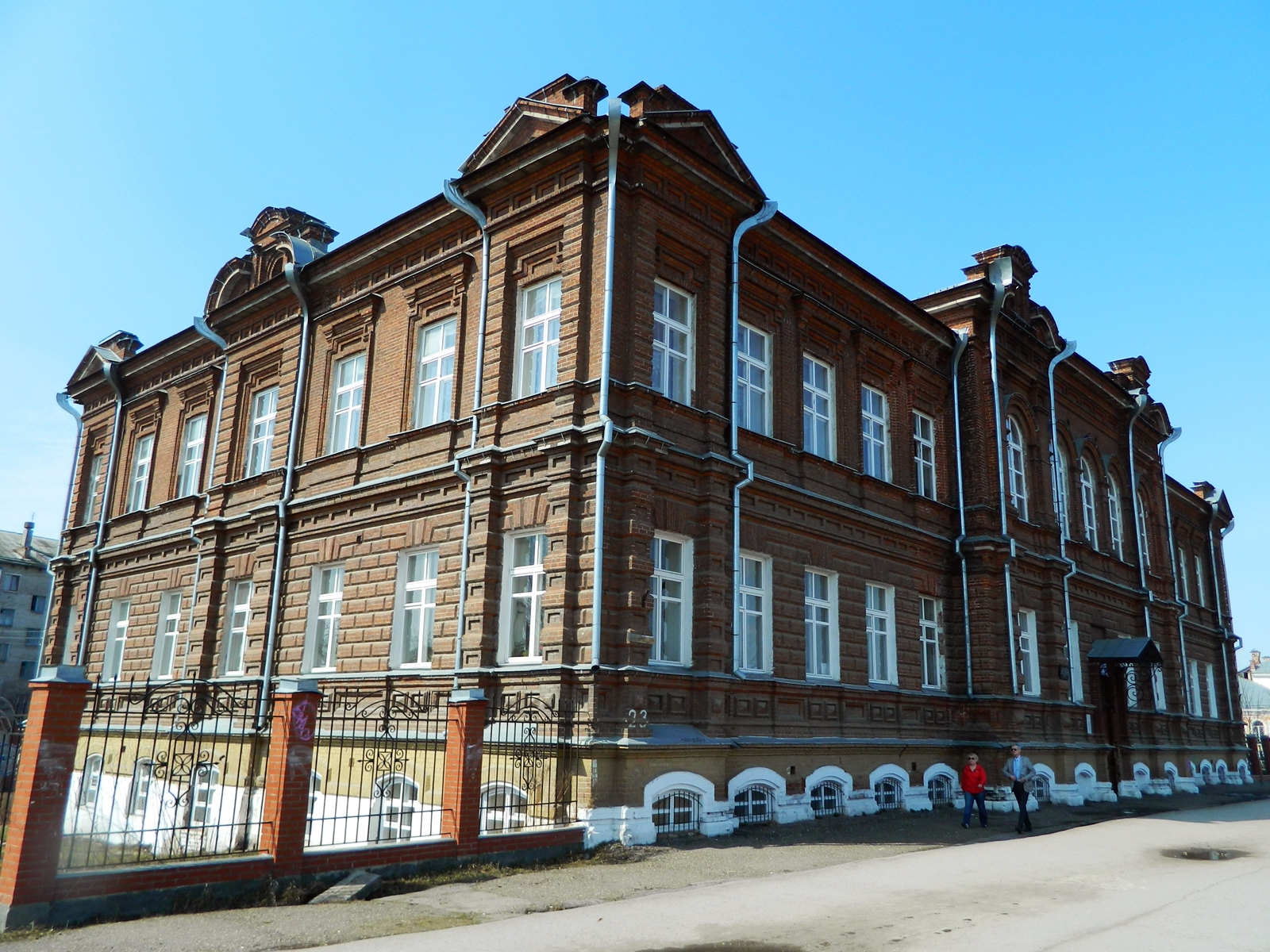 Кунгурское городское четырёхклассное училище